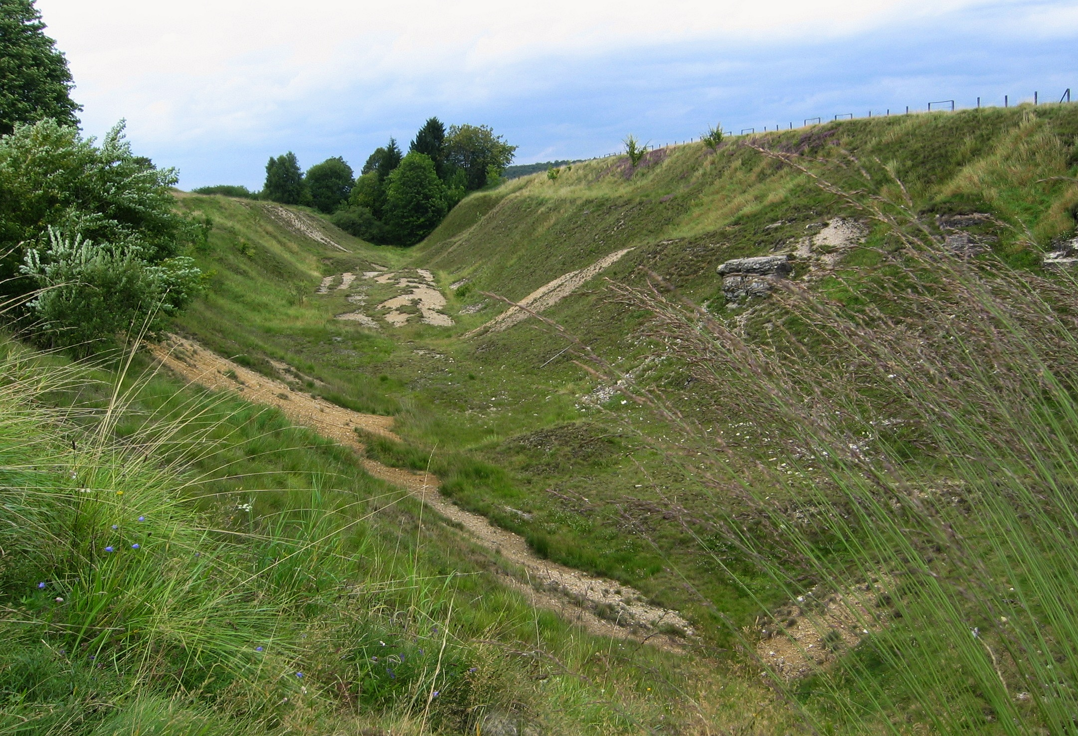 Naturschutzgebiet Bleikuhlen, Lichtenau-Blankenrode, Westfalen, Deutschland.